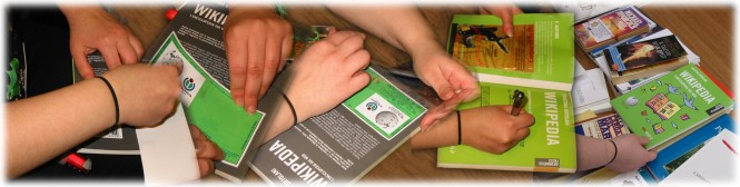 Wikipedia e BookCrossing a Galassia Gutenberg 2008: le fasi di etichettatura di un libro "libero", prima di essere rilasciato presso la zona di scambio ufficiale (OCZ) temporanea , allestita durante la manifestazione a Napoli.